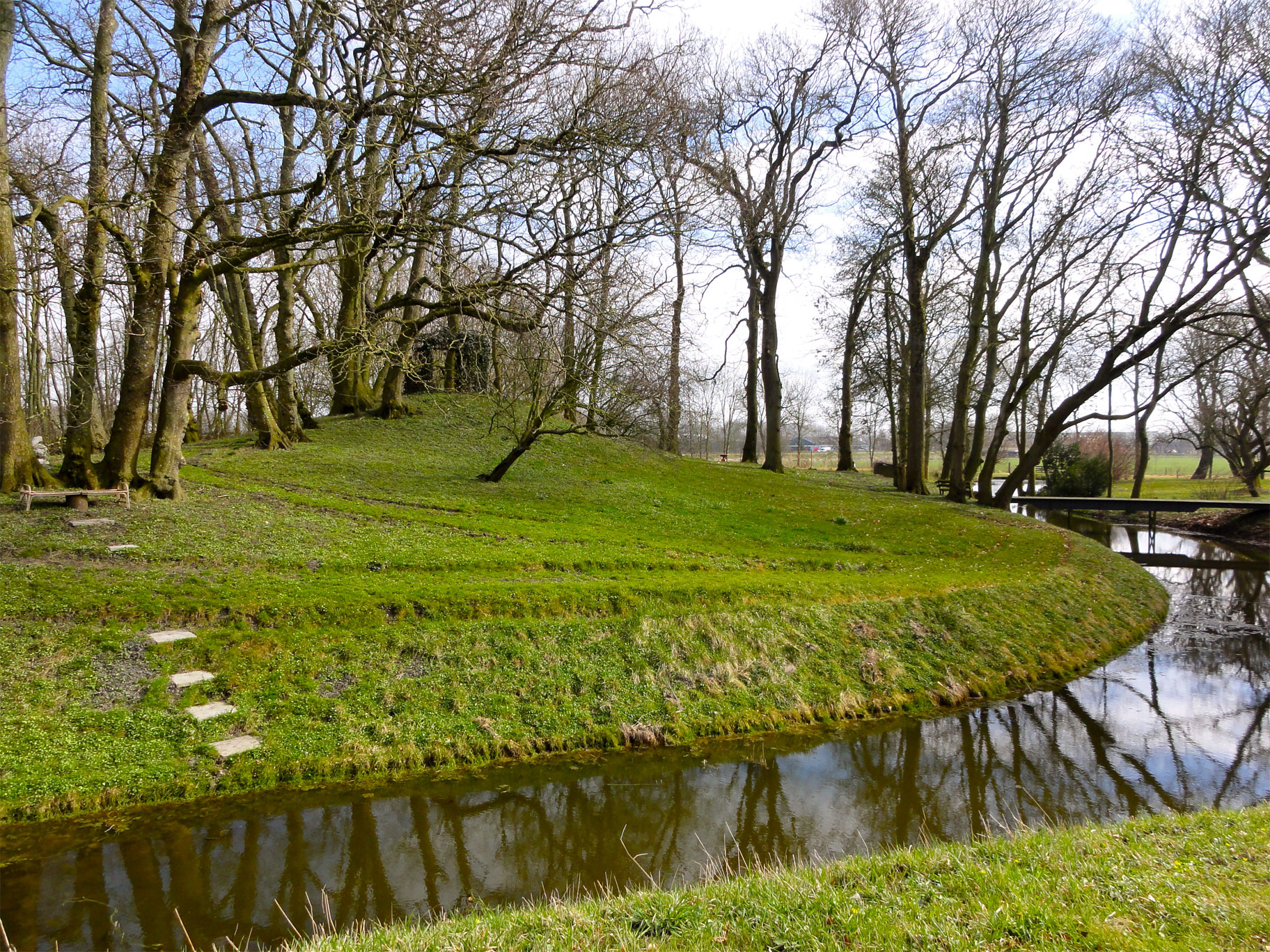 Tuin bij de boerderij aan de Meijmaweg 4 te Rasquert